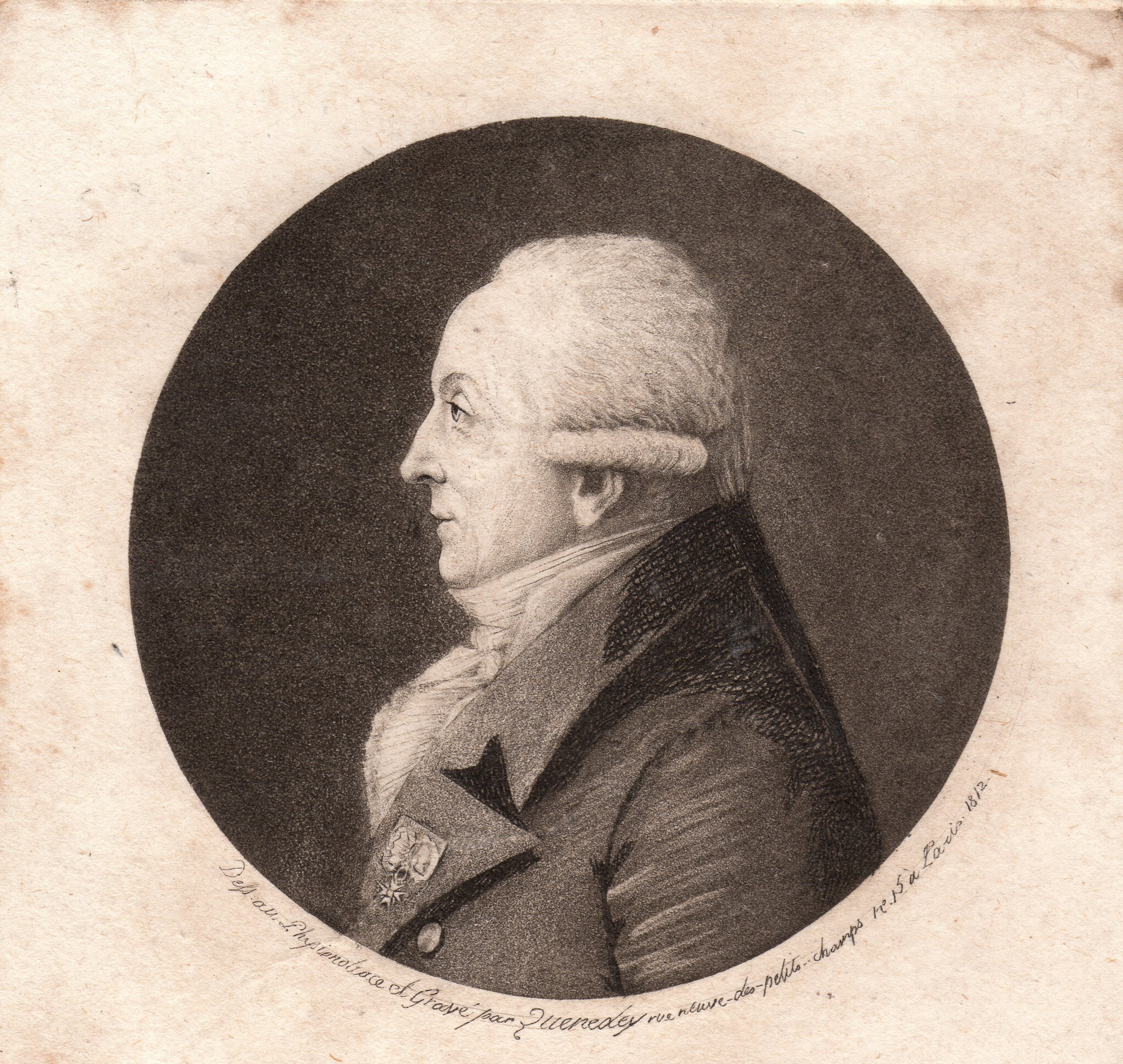 saulieu